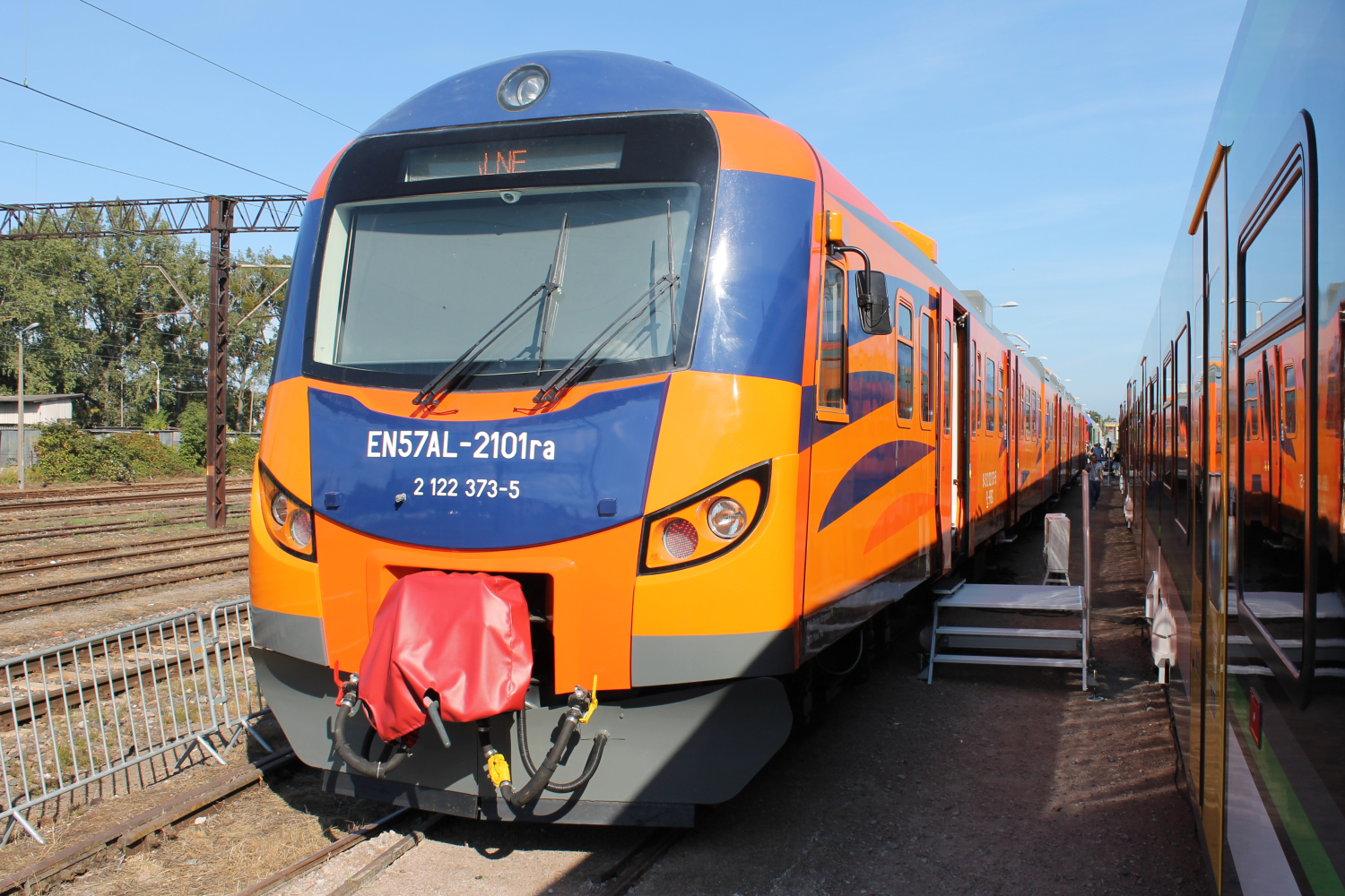 Elektryczny zespół trakcyjny EN57AL-2101 zaprezentowany przez Przewozy Regionalne podczas 11. Międzynarodowych Targów Kolejowych Trako 2015. Jednostka powstała ze składu EN57-1546 wyprodukowanego w 1983 przez Pafawag Wrocław. Modernizacja została wykonana w ZNTK Mińsk Mazowiecki i ukończona na początku września 2015, aczkolwiek dokładny dzień nie został podany na pudle pojazdu. The making of this document was supported by Wikimedia Polska Association, within Wikigrant no. WG 2015-34. English | polski | +/−